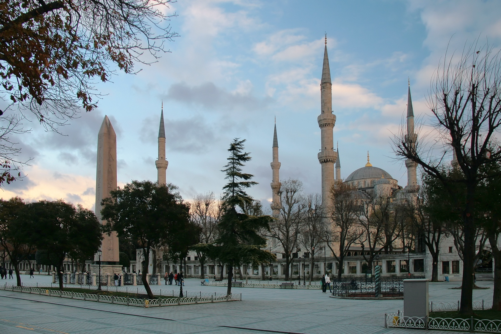 Sultanahmet